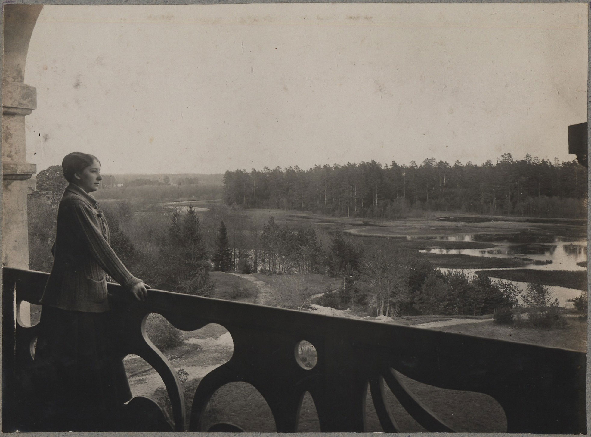 Беларуская (тарашкевіца): Крупкі (Krupki), сядзіба Сьвяцкіх (Śviacki)